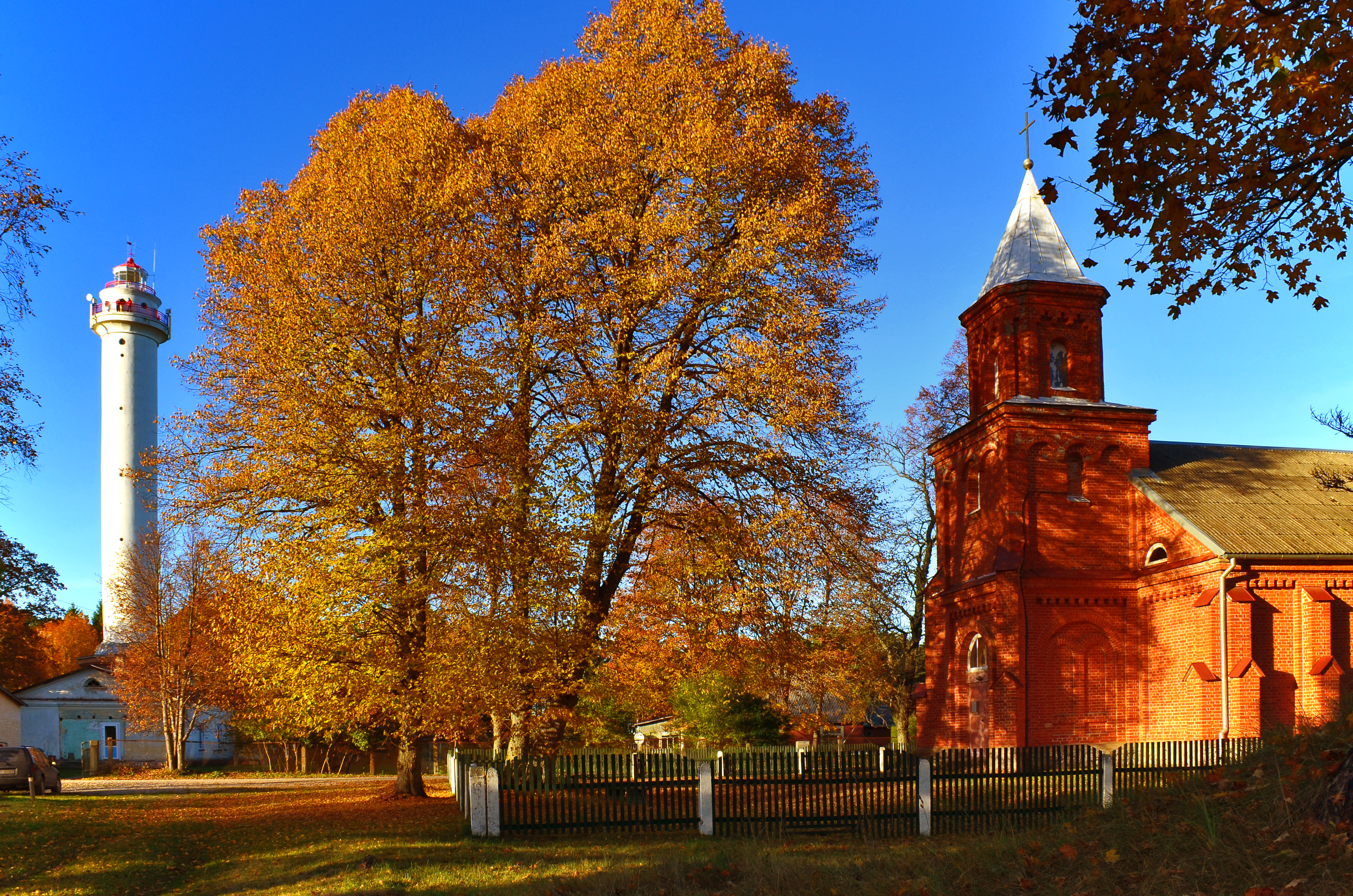 Bāka un baznīca Miķeļtornī